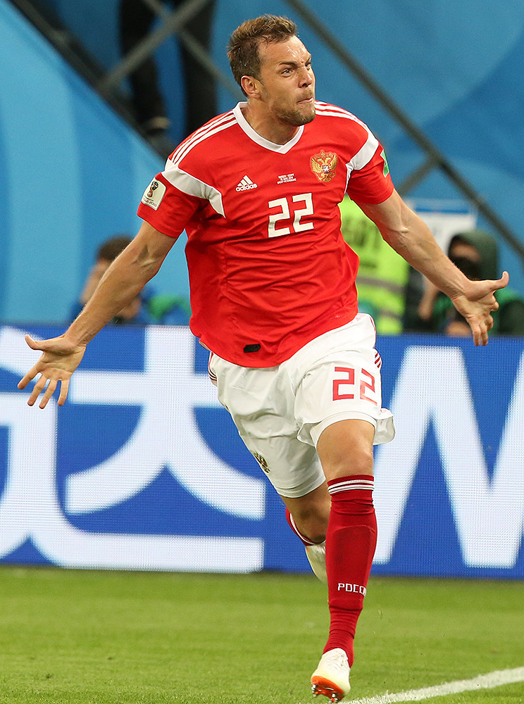 Историческая победа сборной России в матче с Египтом!